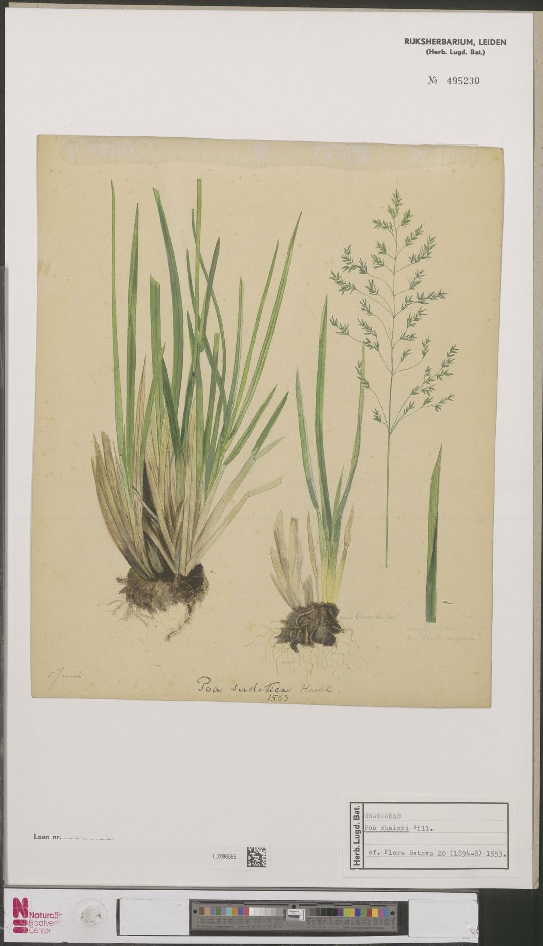 Poa chaixii Vill